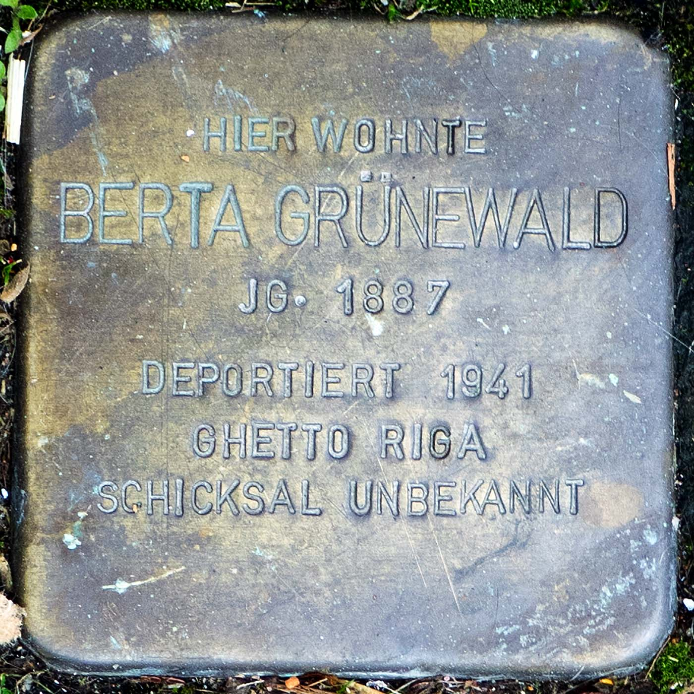 Stolperstein für Berta Grünewald (Willich)